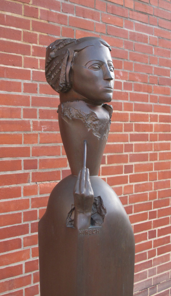 Büste von Rahel Hirsch auf dem Campus der Charité Erste Professorin der Medizin in Preußen Gestiftet zum 125. Jahrestag